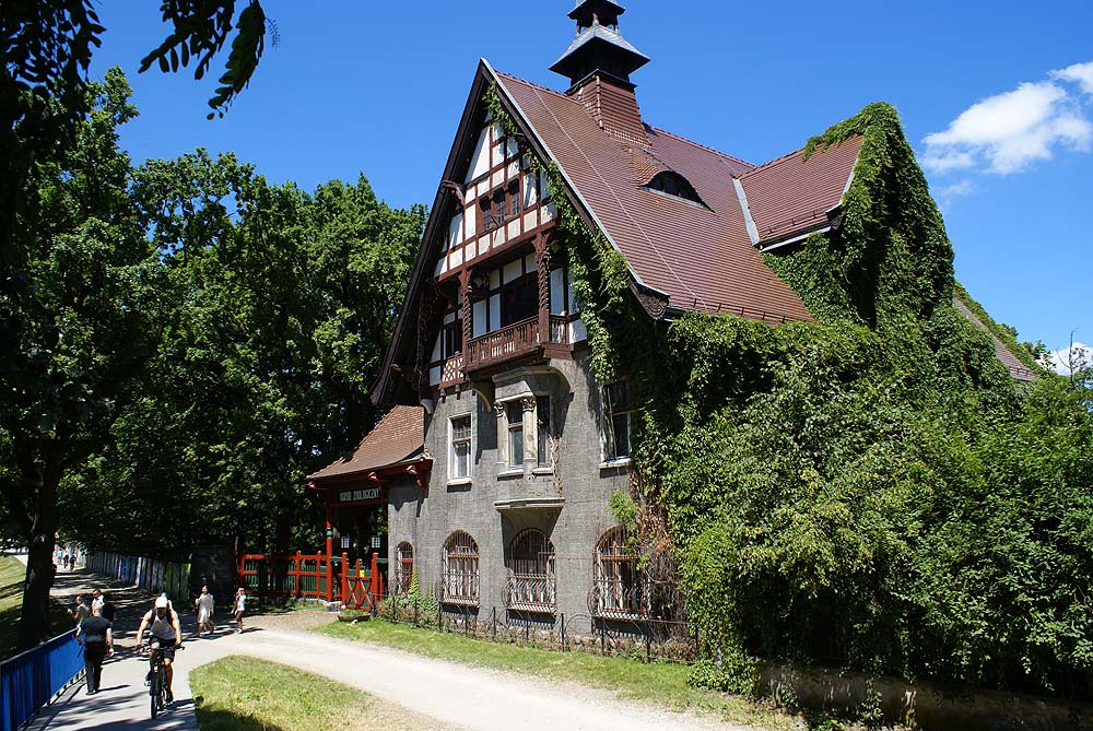 Wrocław Śródmieście, ul. Wróblewskiego 1 - Ogród Zoologiczny: dom dyrekcji (zabytek nr A/5263/361/Wm)